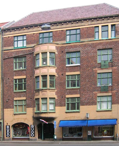 Hus ritat av Harald Bergelin på Östra Förstadsgatan i Malmö